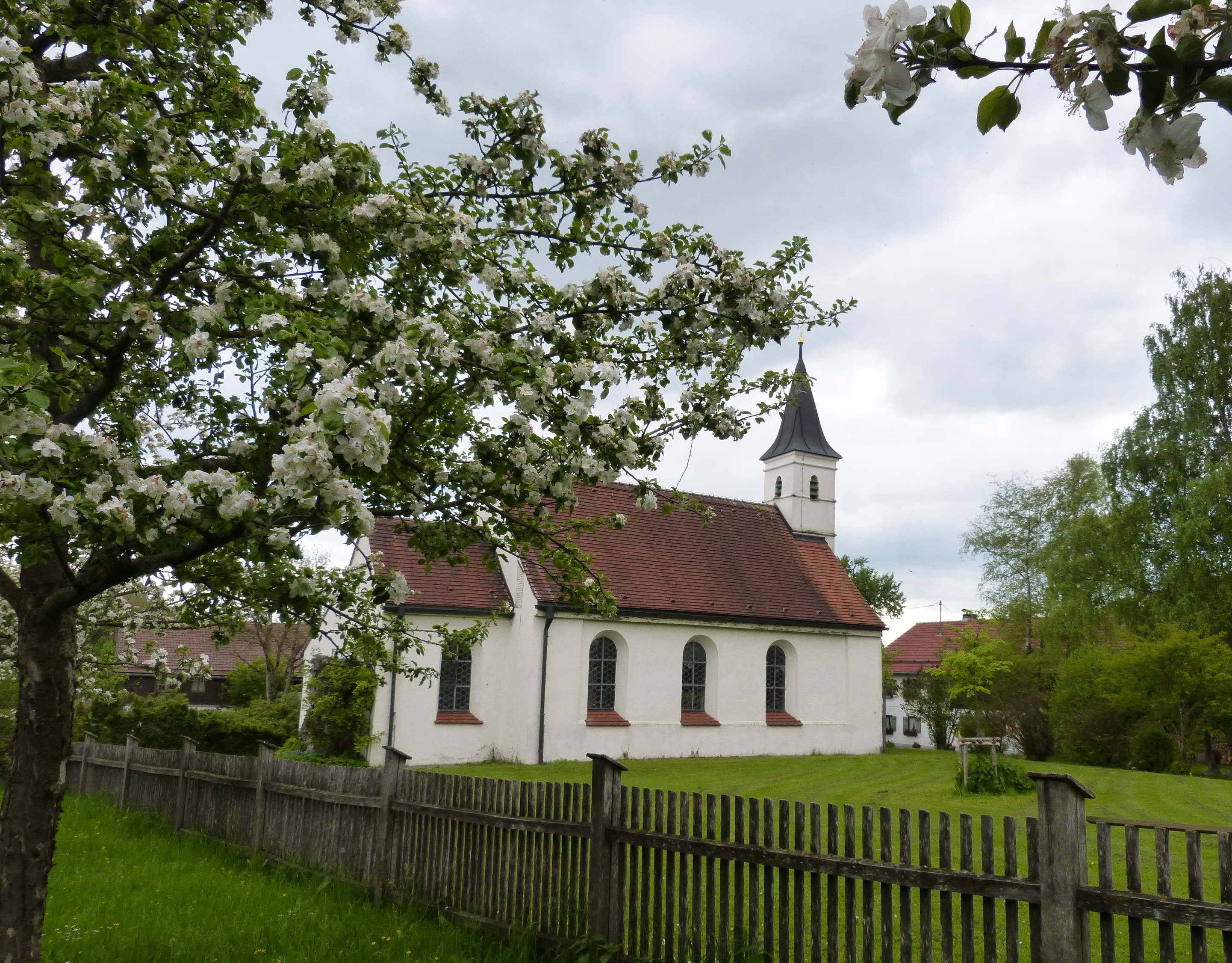 Pähl, OT Kerschlach. Die Dorfkirche St. Ulrich ist ein im Kern mittelalterlicher Saalbau mit stark eingezogenem Rechteckchor, angefügter Sakristei und massivem Dachreiter. Eine Umgestaltung des Gebäudes erfolgte in der 2. Hälfte des 17. Jahrhunderts.